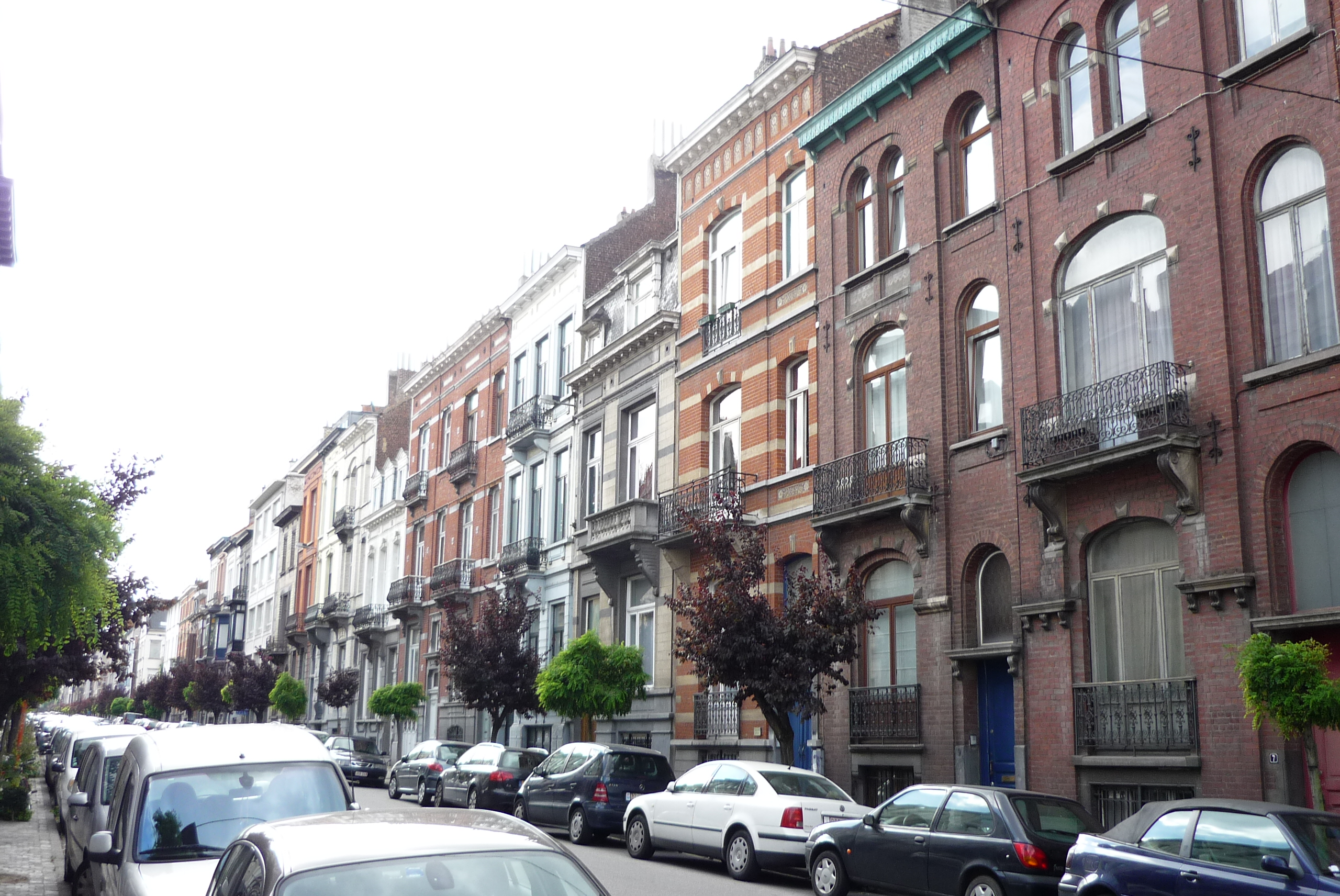 Le commencement de la rue Franz Merjay (jadis rue de la Culture) à Ixelles (Bruxelles), le 12 septembre 2009.